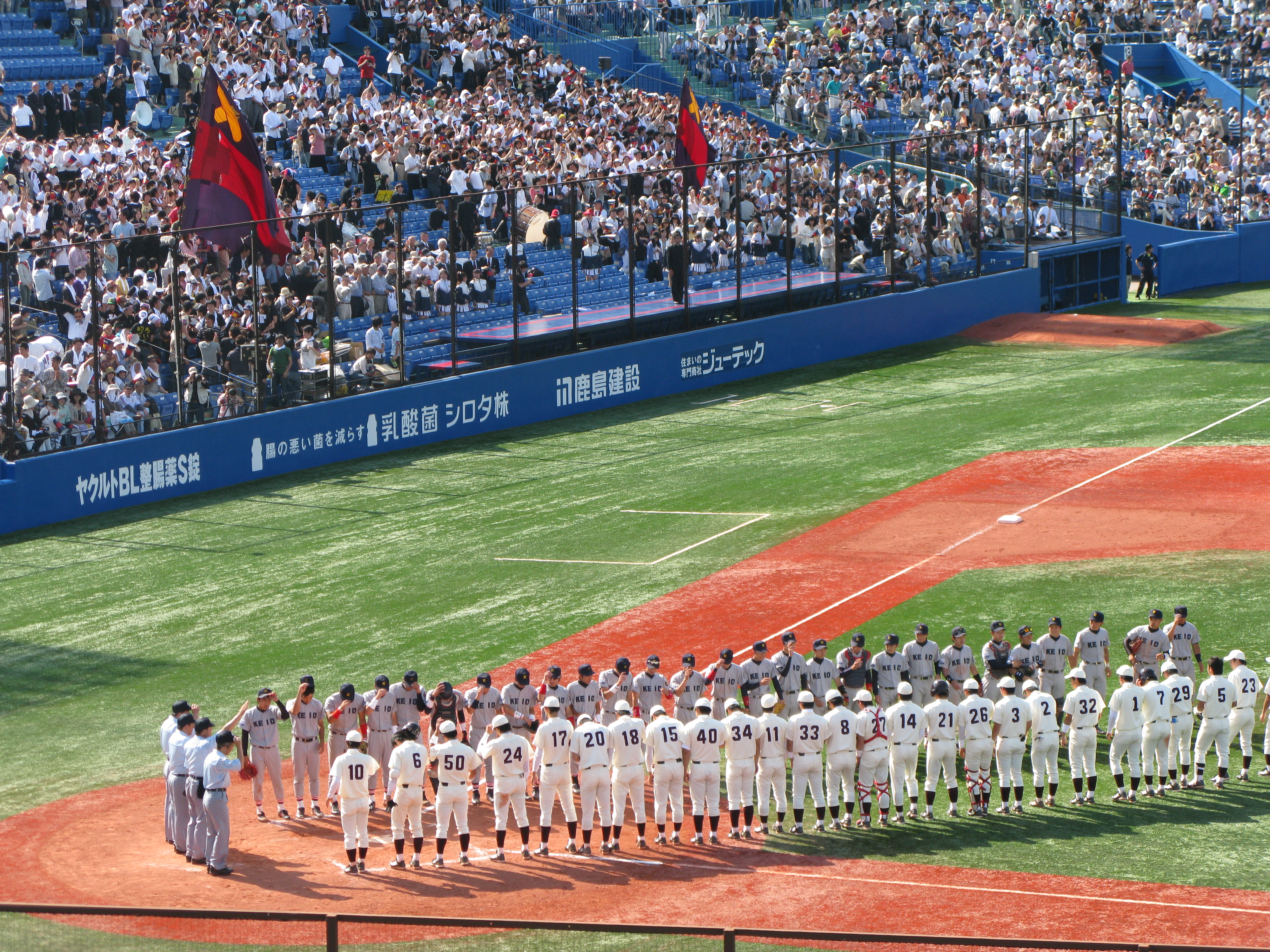 Wikipedia 10 Rennes